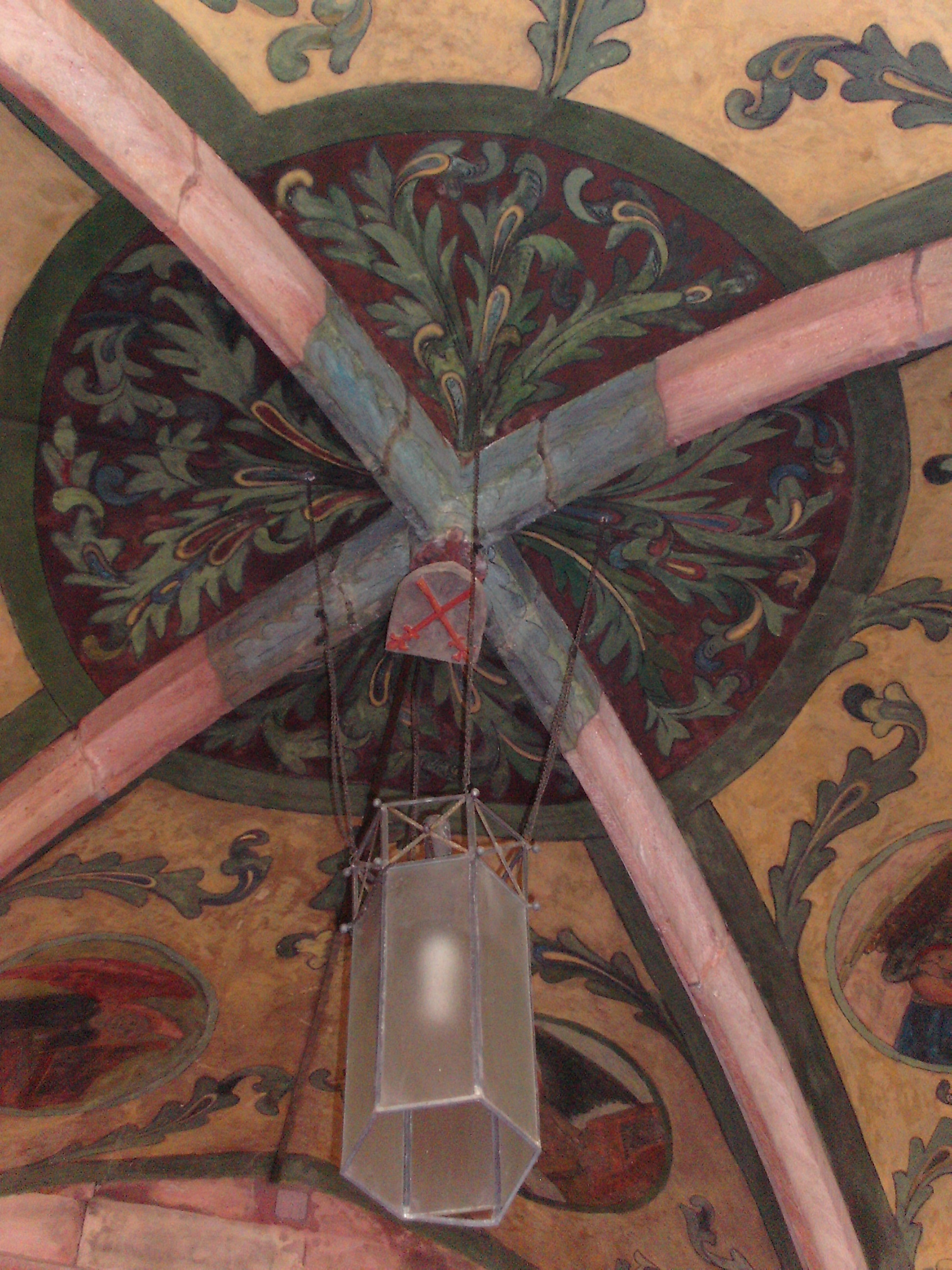 Gewülbeschlusstein mit dem Wappen derer von Venningen, Paradies der Stiftskirche Neustadt